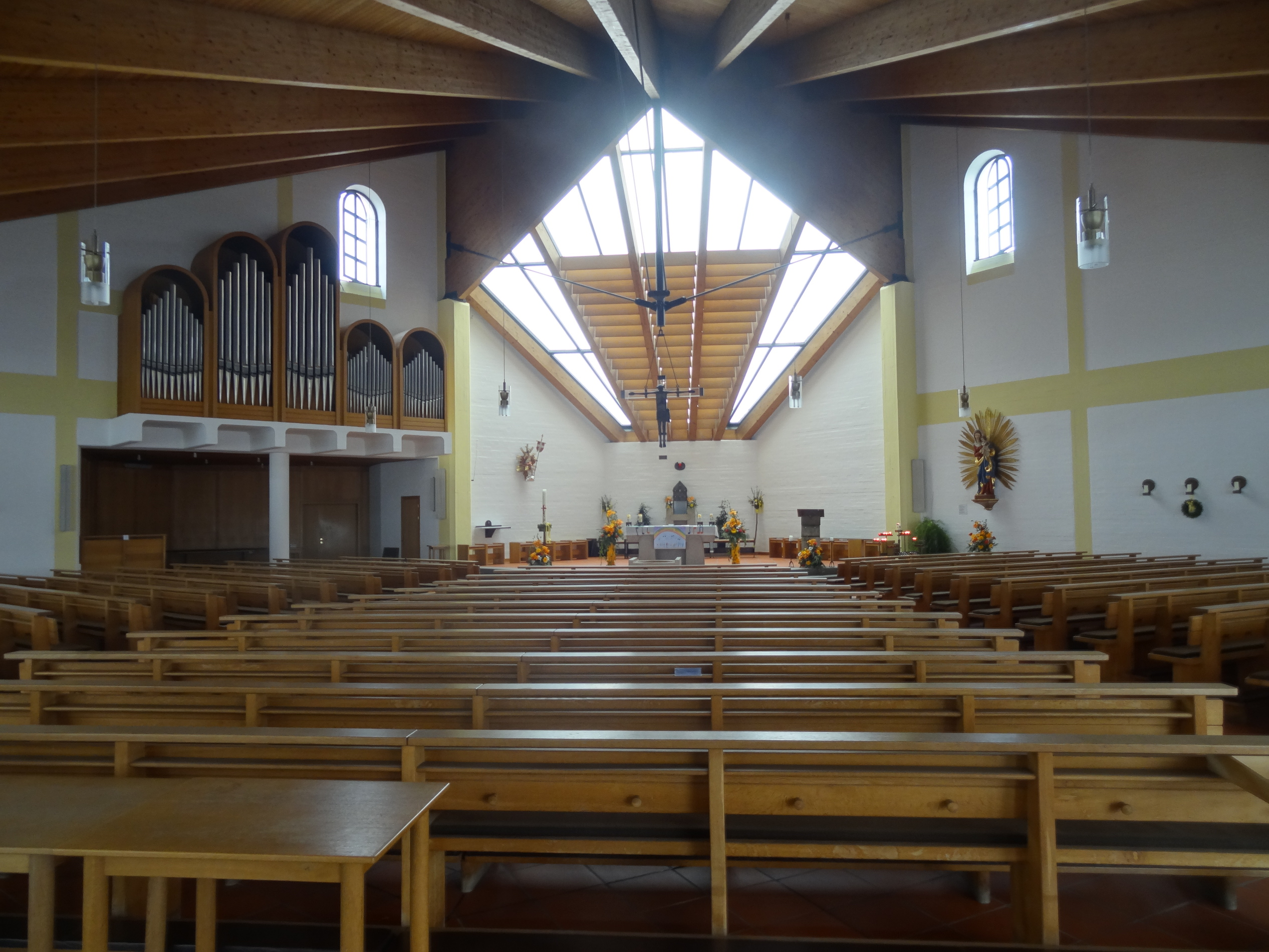 Innenraum der Pfarrkirche Neu-St. Nikola in Altdorf (bei Landshut)